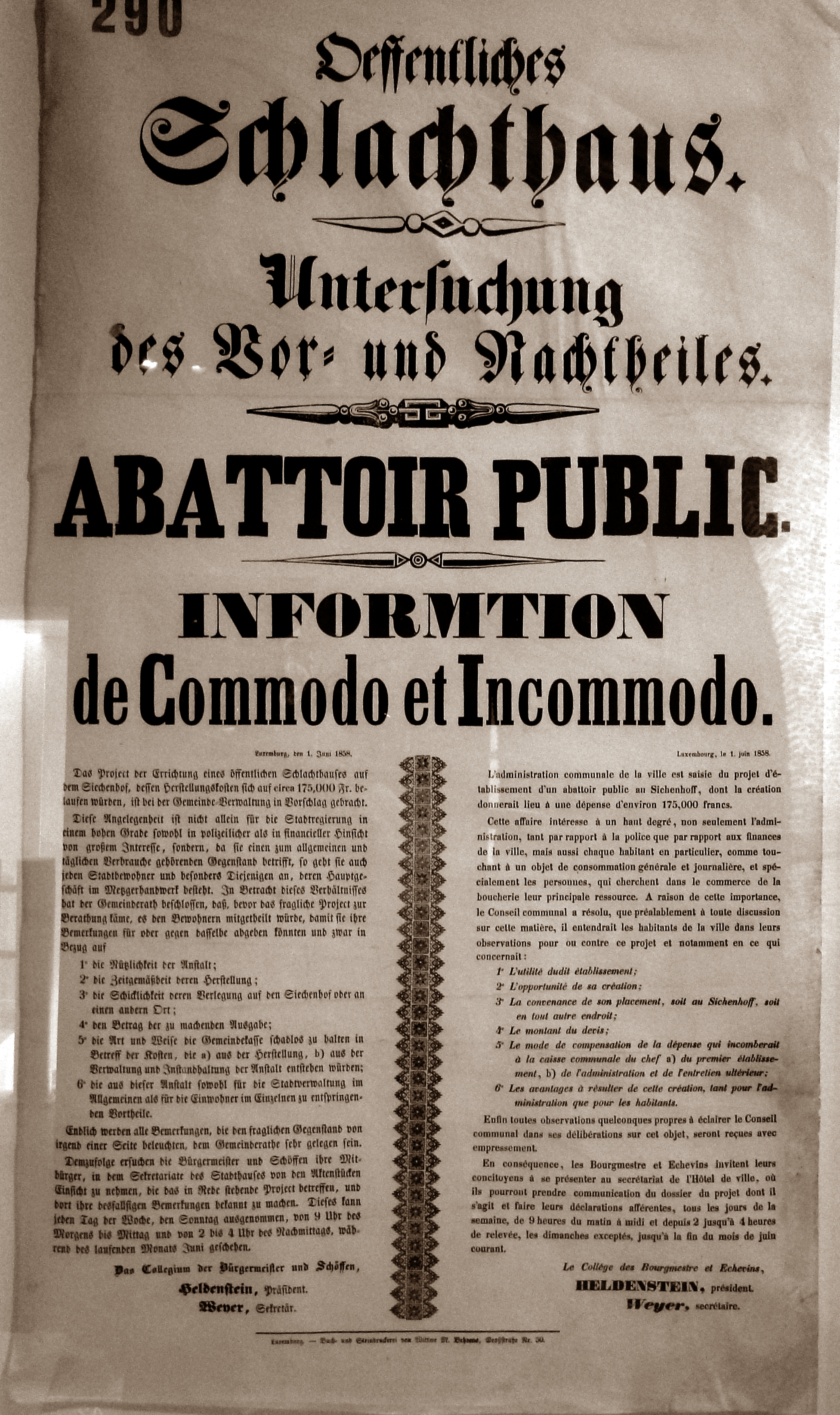 Affiche d'enquête "commodo et incommodo" sur la question de l'établissement d'un abattoir à Luxembourg-ville (1er juin 1858). Photo de l'affiche prise dans le cadre de l'exposition „De Pafendall, Histoires d’un quartier – Geschichten eines Stadtviertels“ au Musée d'Histoire de la Ville de Luxembourg